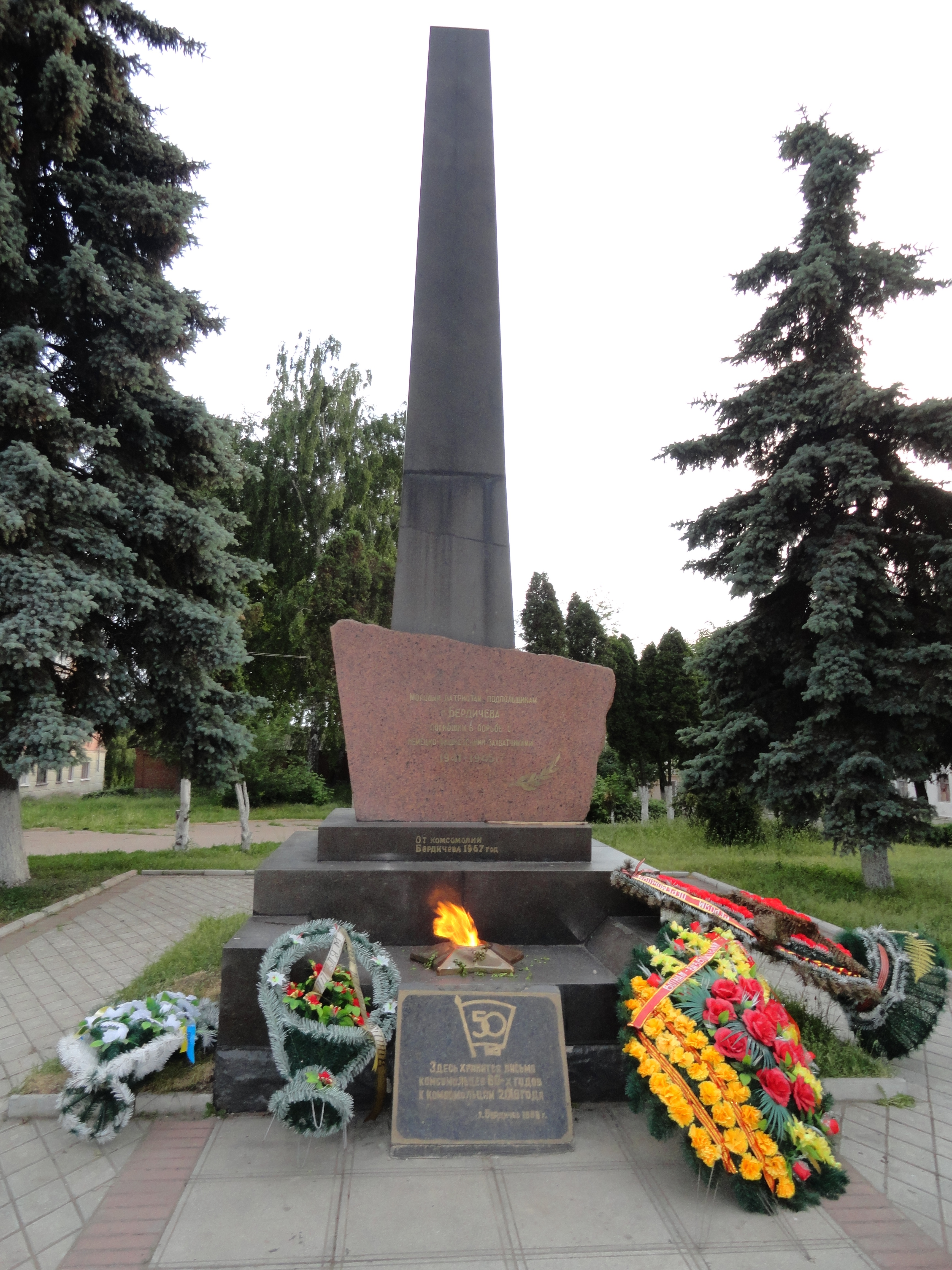 Центральна частина міста. Встановлено пам'ятний знак учасникам комсомольсько-молодіжного підпілля. Обеліск увіковічує пам'ять підпільної комсомольсько-молодіжної організації, що діяла у Бердичеві в роки фашистської окупації. Обеліск 3-х ступінчатий, пірамідальний з полірованого лабрадориту. Розміри обеліска 2,25 × 2,25 × 6 м., розміри прапору 1,9 × 1,3 м.